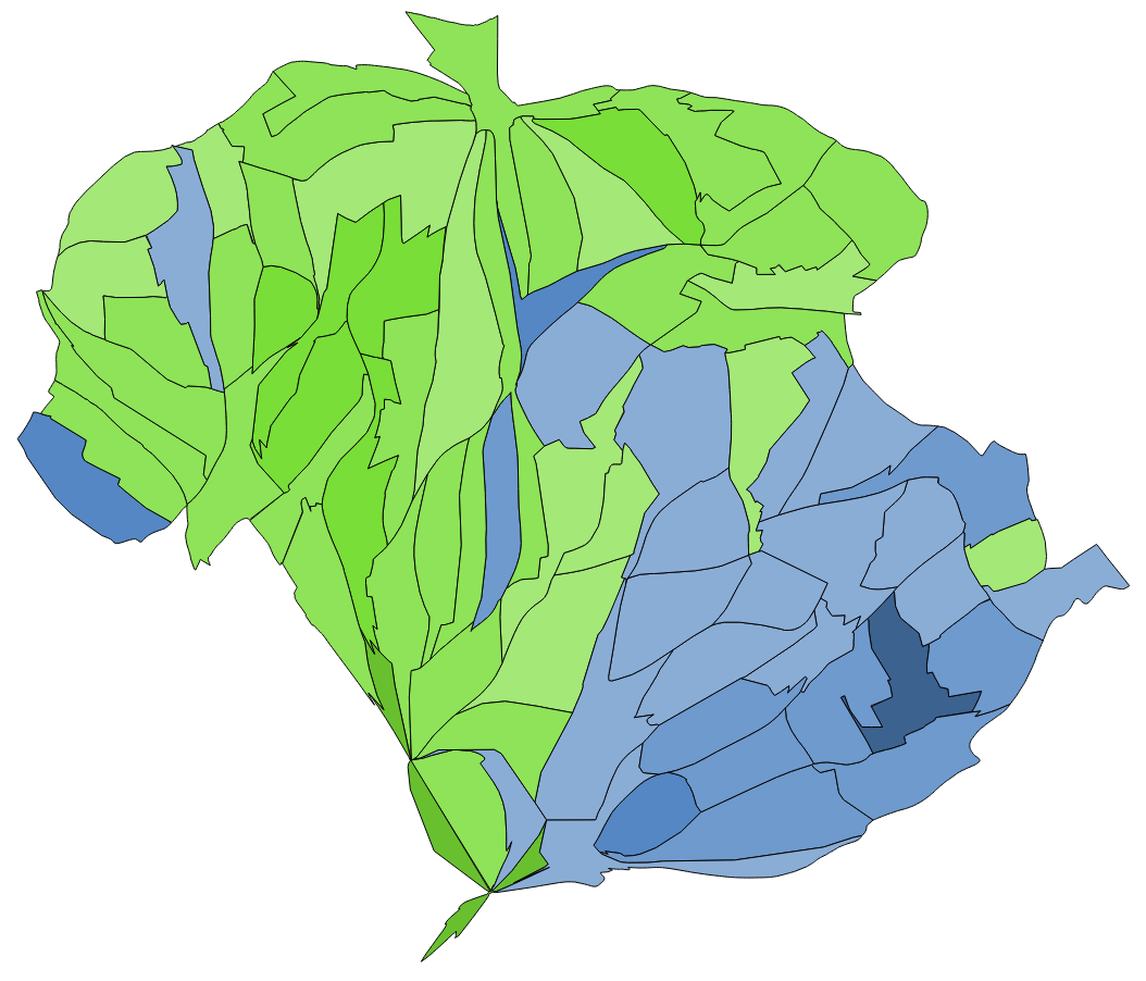 顏色對照表